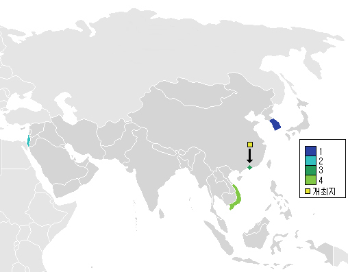 1956년 AFC 아시안컵 정보